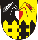 Znak obce Oplocany